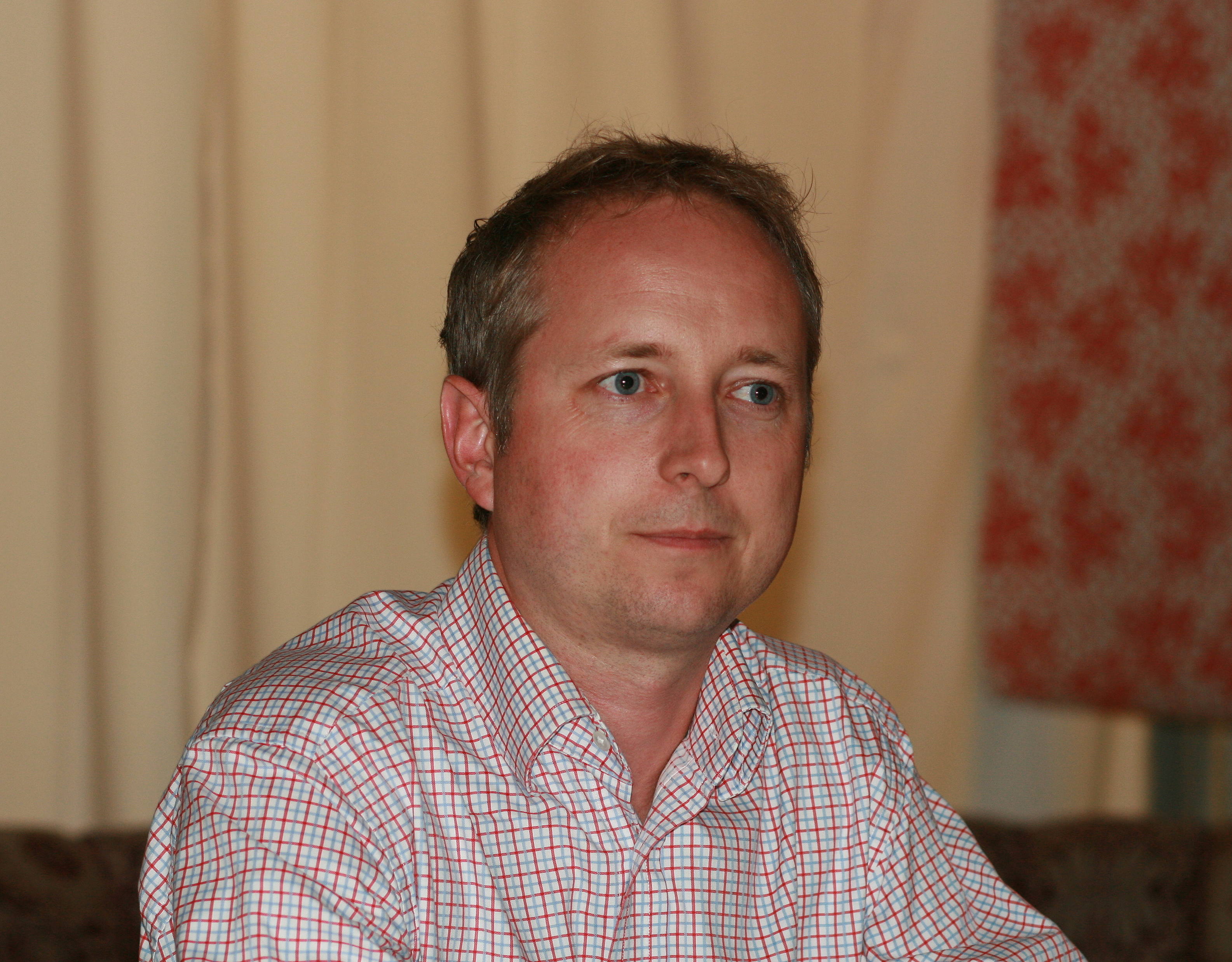 Bård Vegar Solhjell